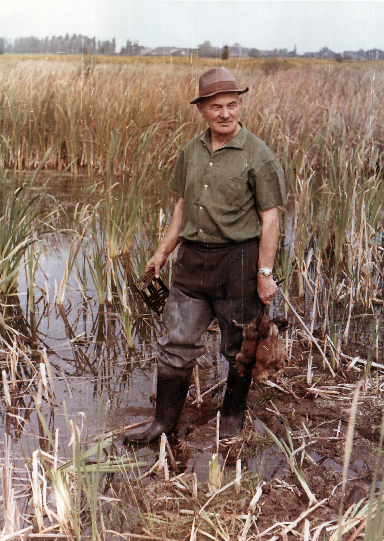 Max Hoffmann (* 6. Juli 1904, † nach 1977), Spezialist für Bisamrattenfang, Konstrukteur von Bisamfallen und Autor von Bisamfachliteratur. Beim Kontrollieren der Fallen.